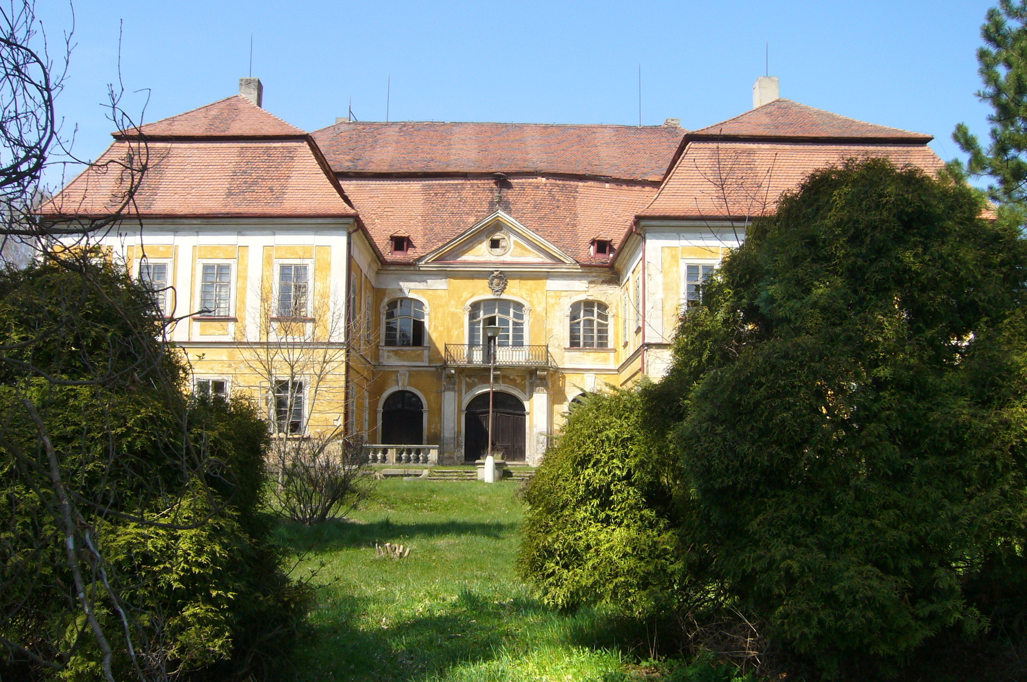 Zámek Olešná, Olešná 1, Olešná (okres Rakovník).